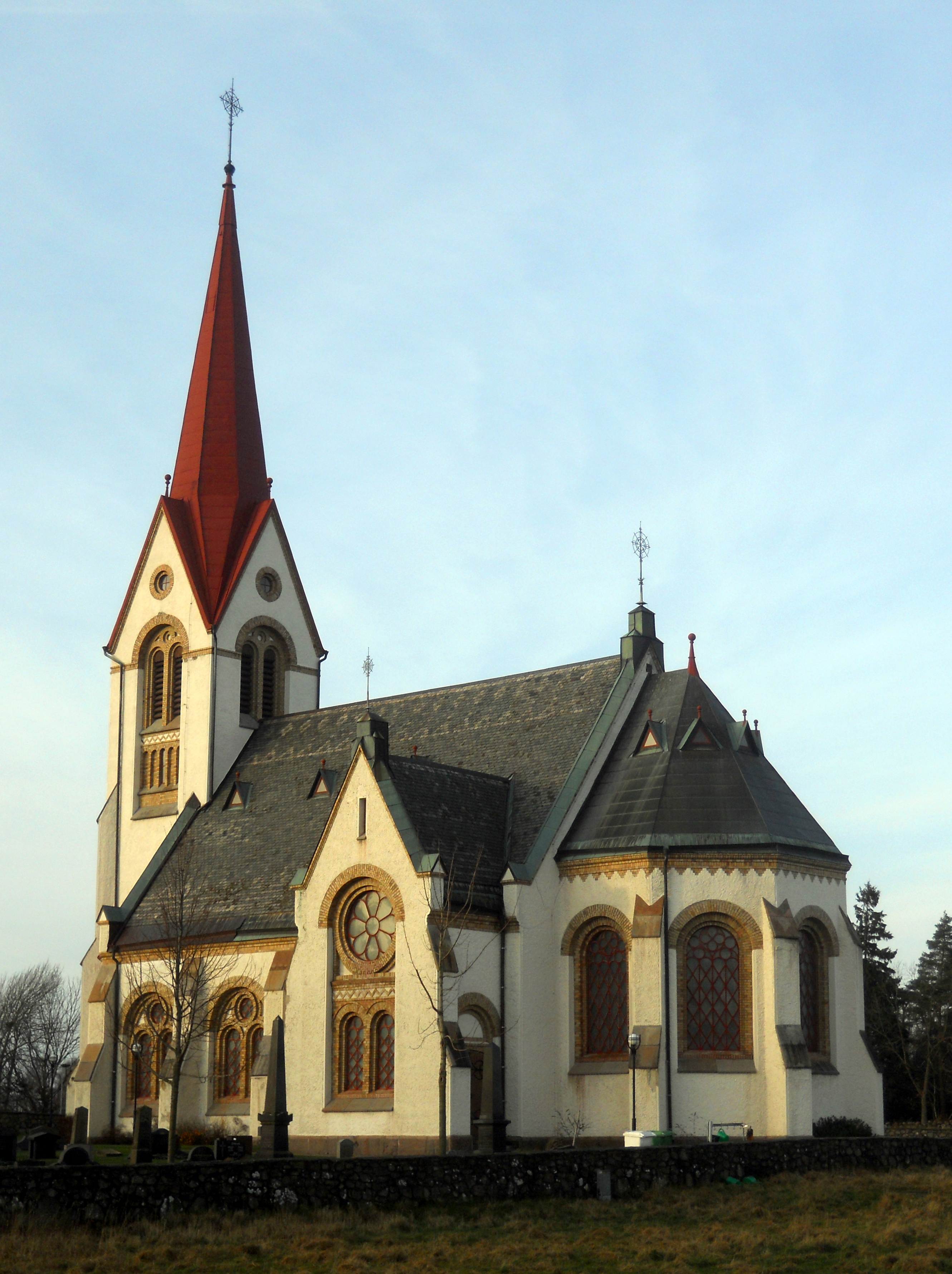 Gödestads kyrka, Varbergs kommun.